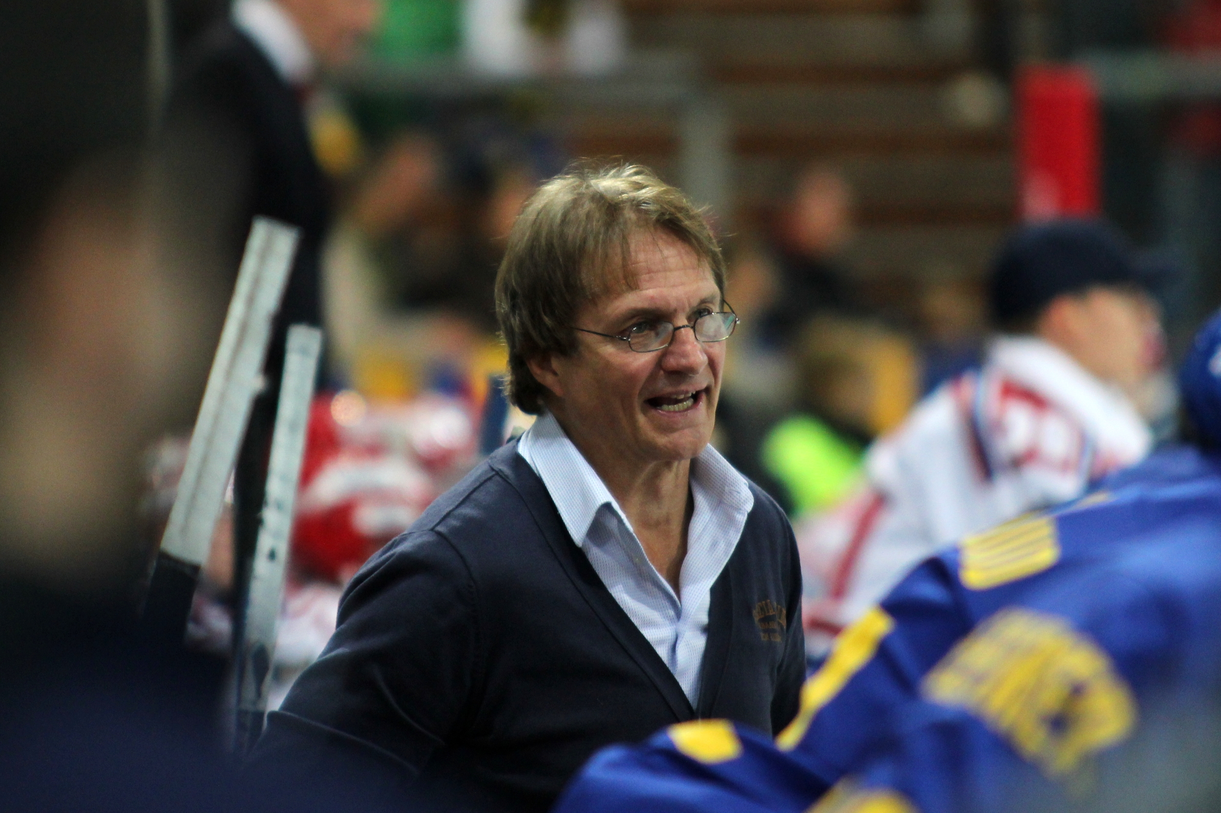 Arno Del Curto (D Head Coach).